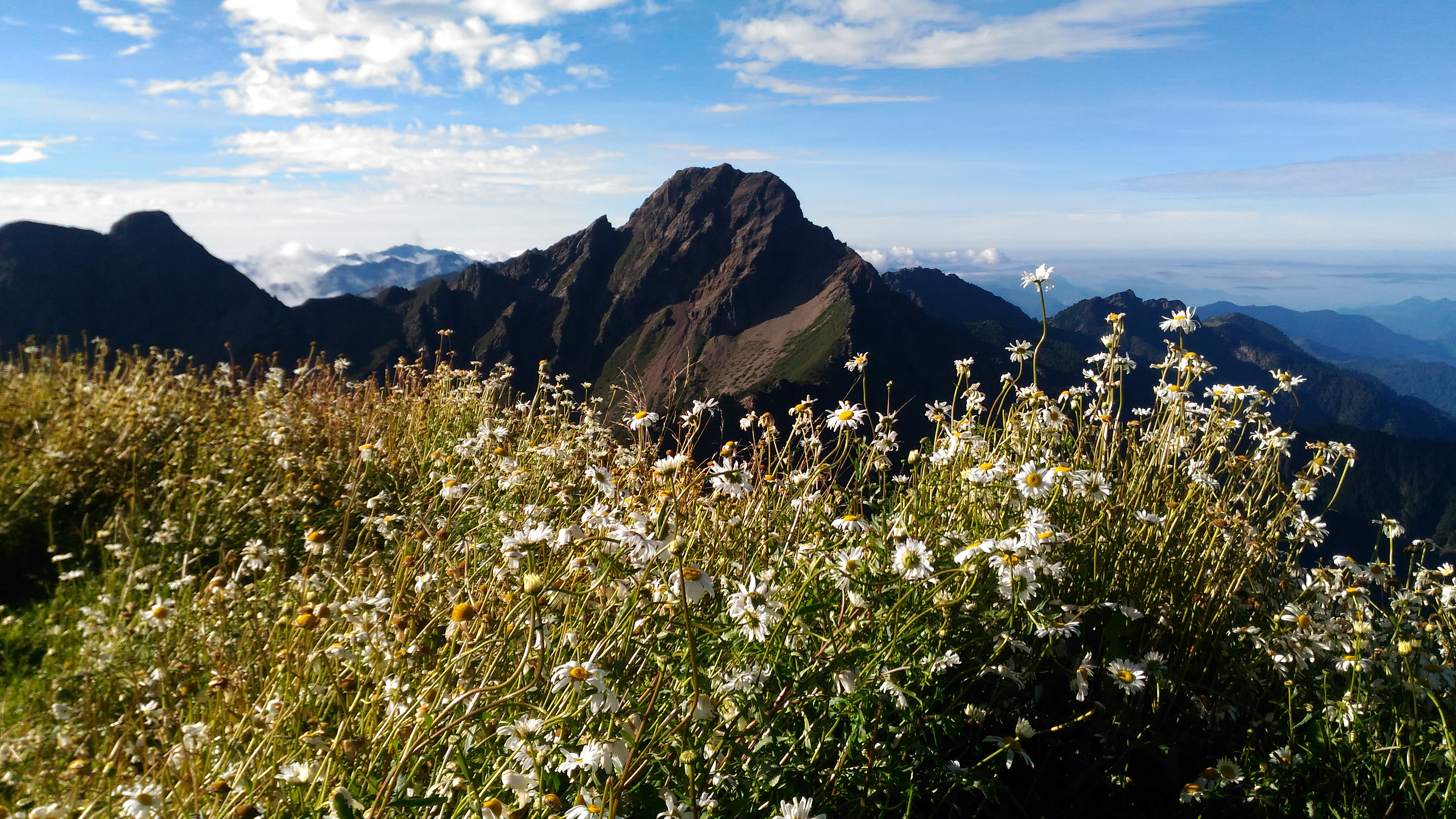 玉山北峰盛開的法國菊，襯托著臺灣第一高峰玉山主峰